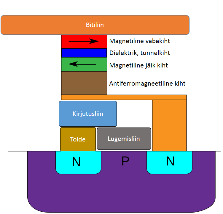 TMR-mälurakk